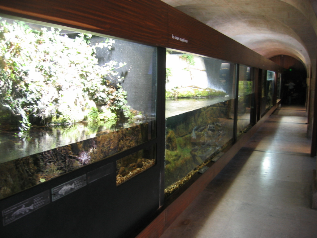 Citadelle de Besançon